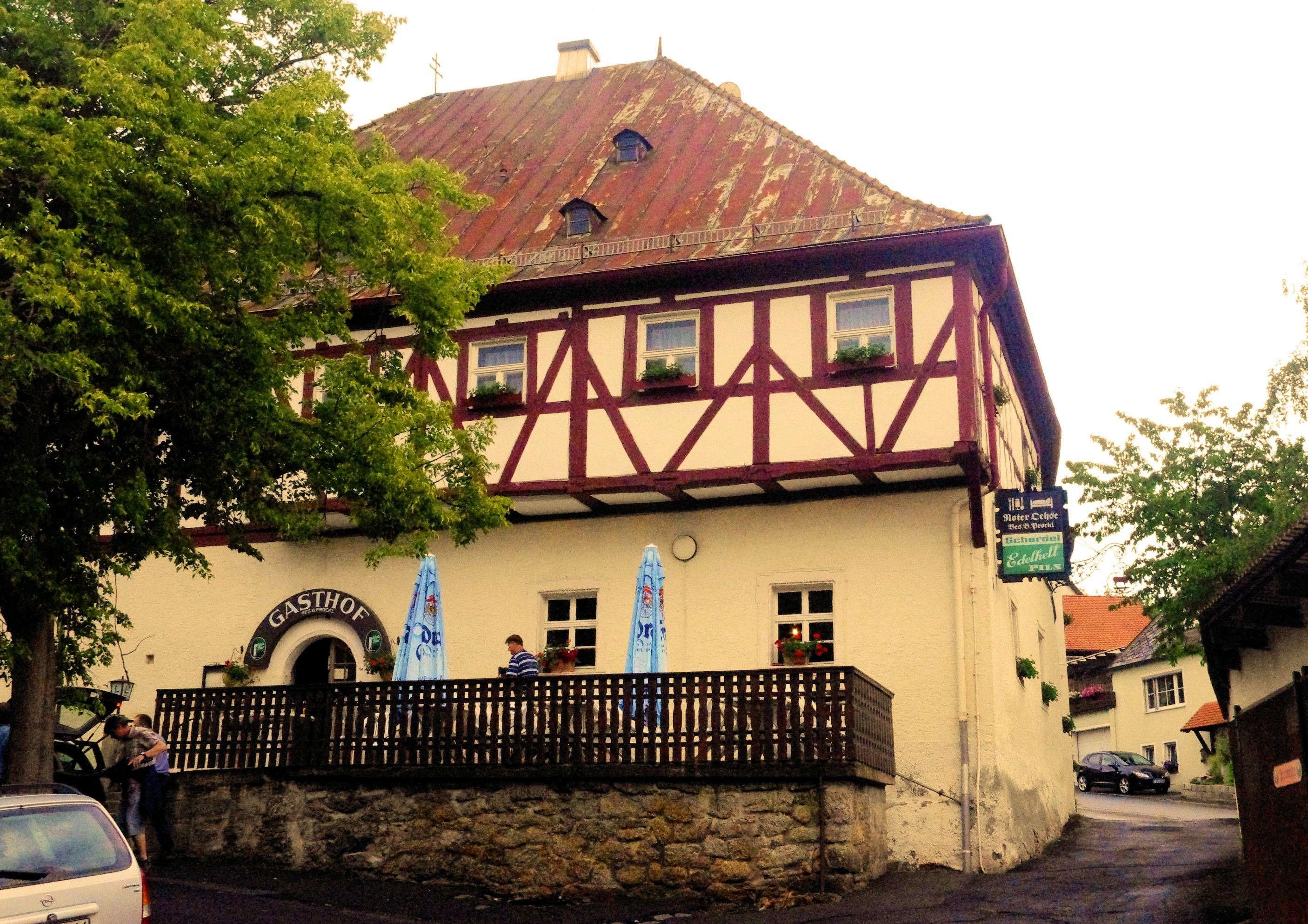 Falkenberg an der Waldnaab: Gasthof "Zum Roten Ochsen"